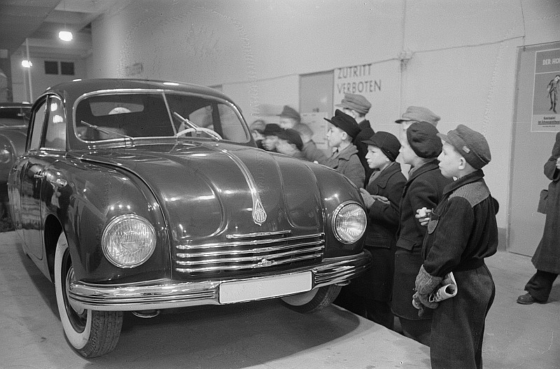 Original image description from the Deutsche FotothekKinder vor einem Tatra T600